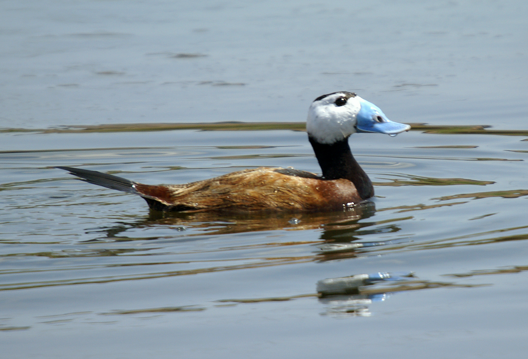 Malvasía cabeciblanca - Ànec cap-blanc - White-headed Duck - Oxyura leucocephala, male, Clot-de-Galvany, Alicante, España